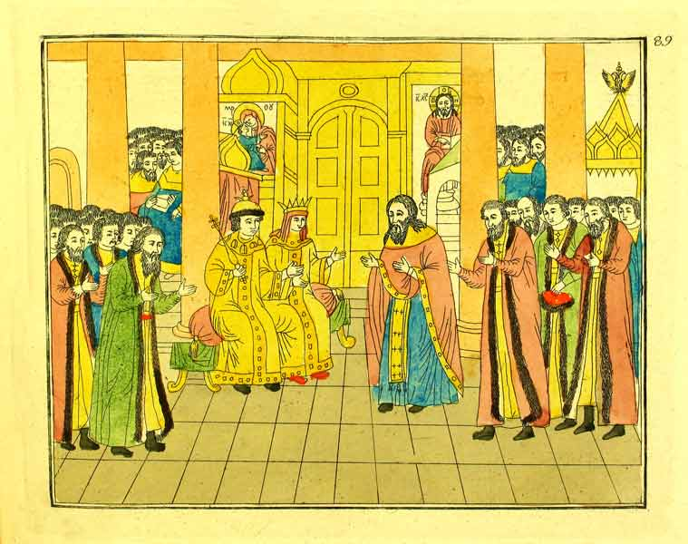 Провозглашение здравицы царю Михаилу Федоровичу и царице Евдокии Лукьяновне. Гравюра, акварель. 1810. По оригиналу последней трети XVII в.